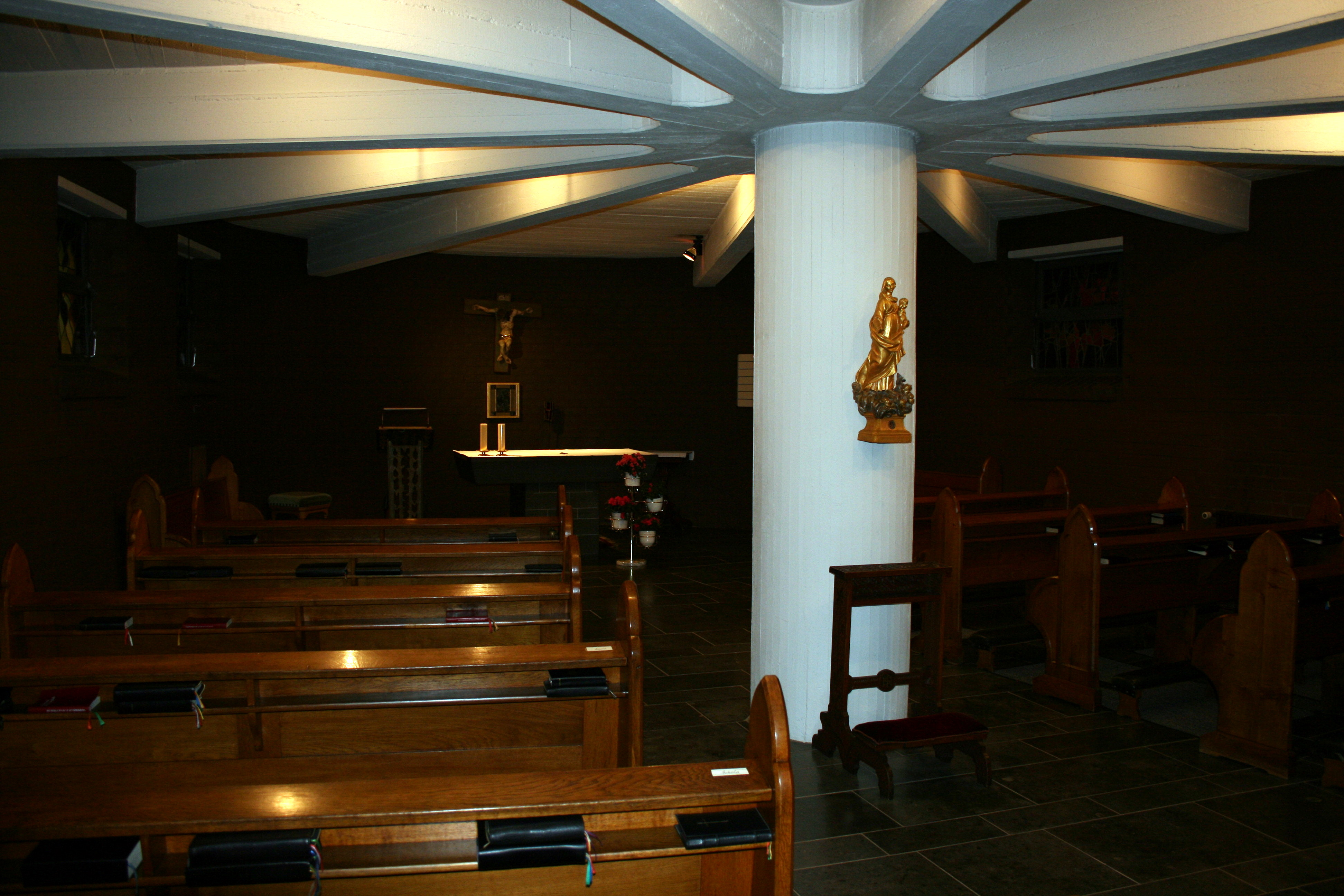 Krypta unter dem Altar der Kirche im Mutterhaus der Franziskanerinnen in Olpe.